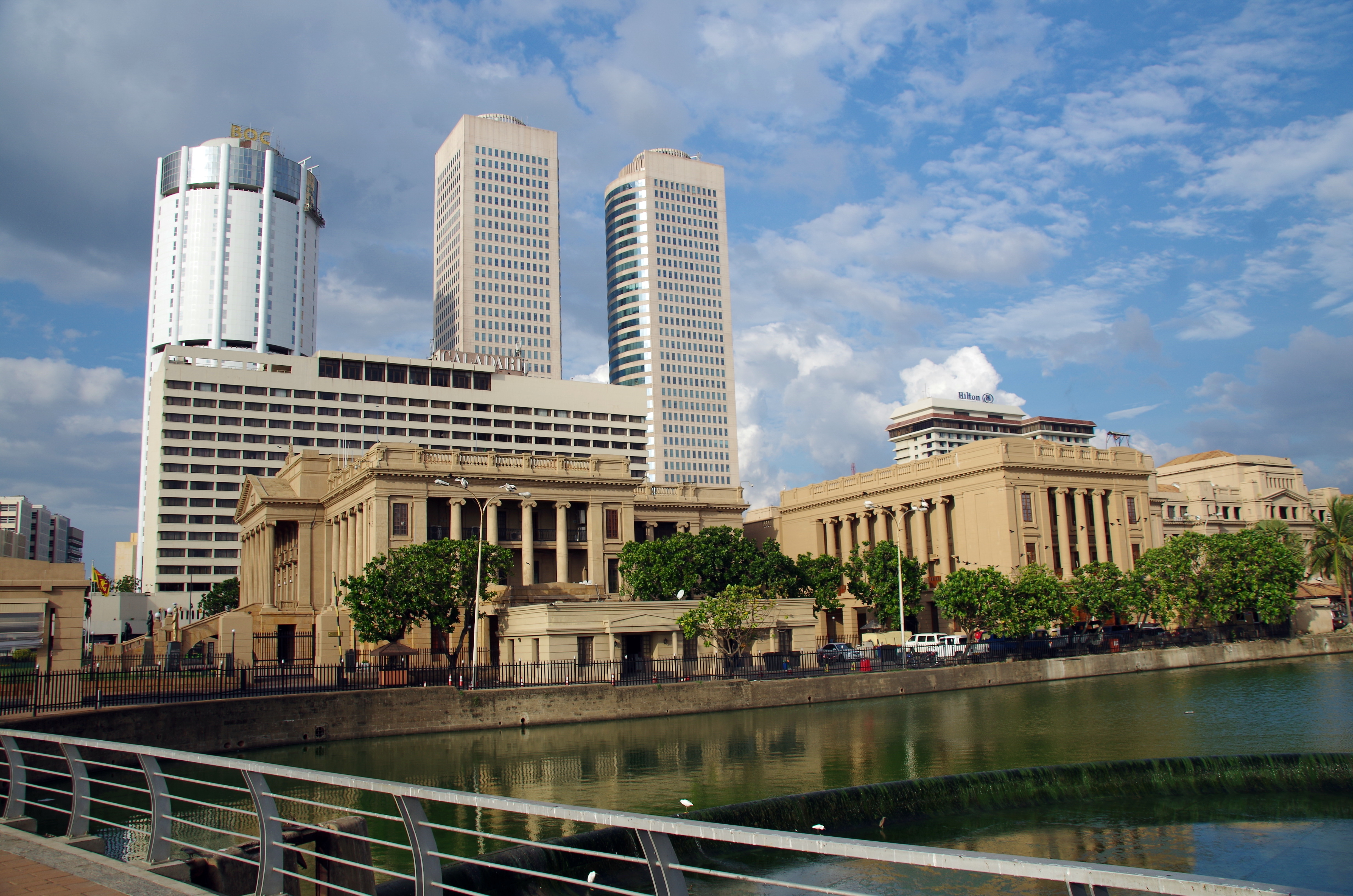 Altes Parlament Colombo